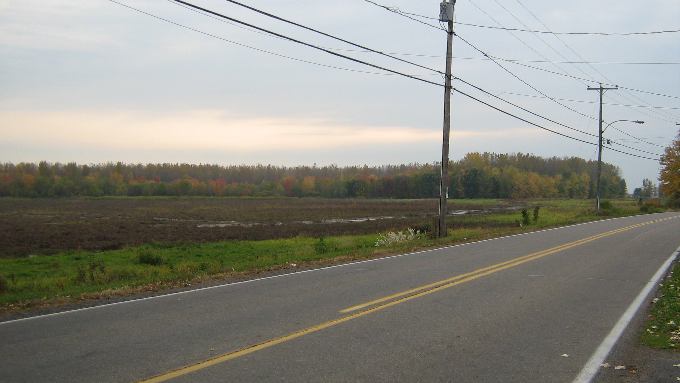 Île aux Sterne (Réserve écologique Marcel-Léger, à Trois-Rivières (Québec) Canada, vue de la rue Notre-Dame Ouest